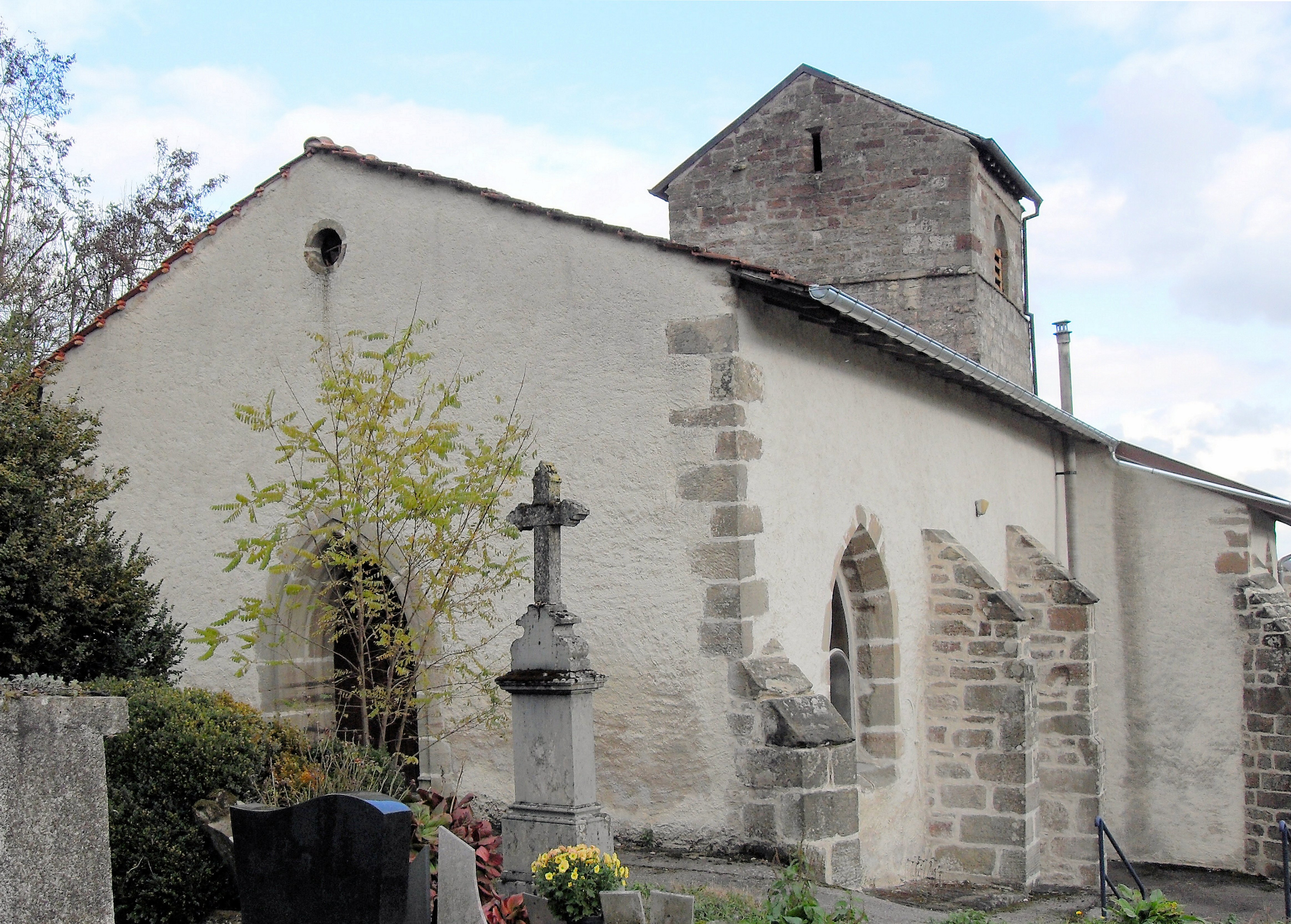 L'église Saint-Baldéric à Gignéville